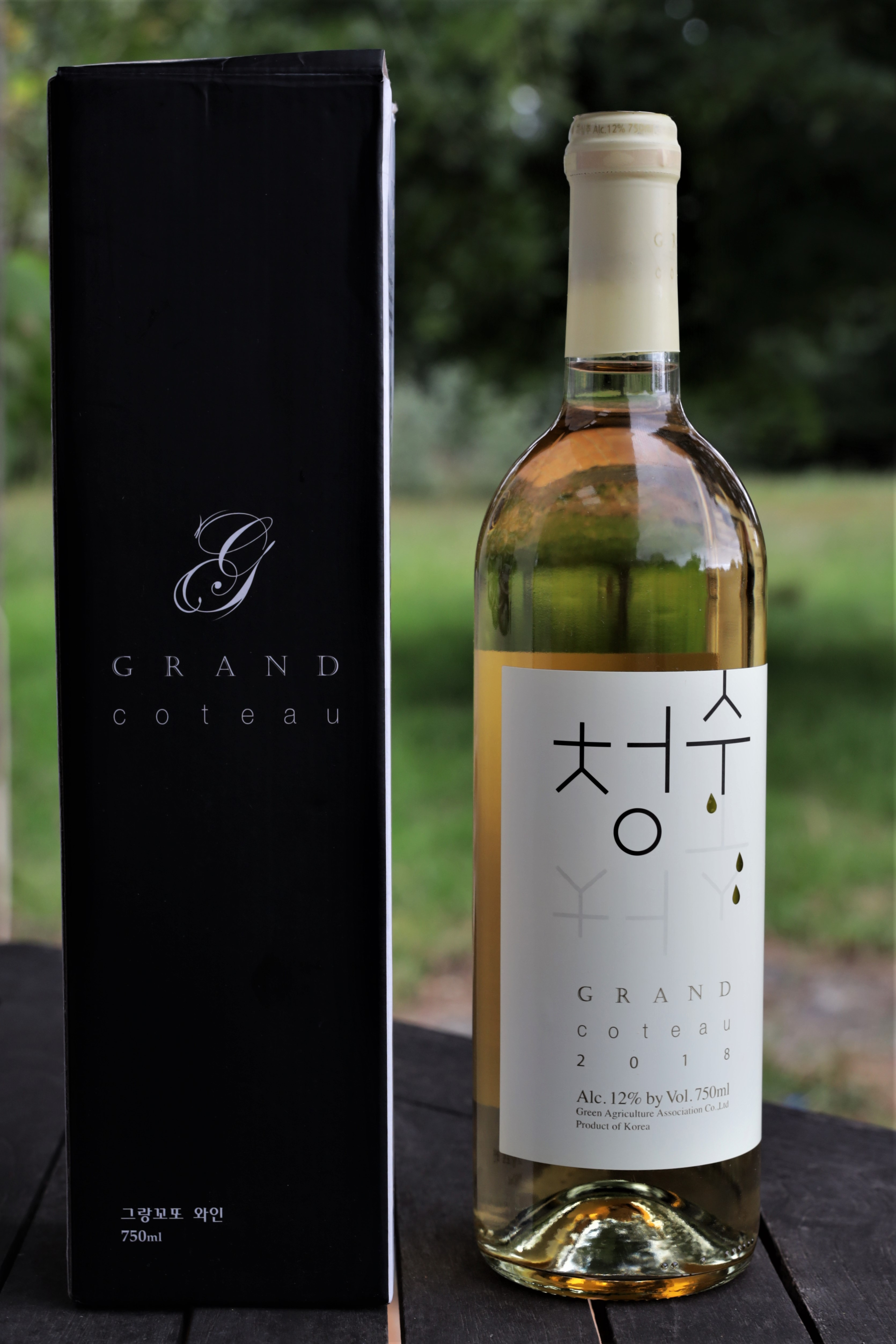 Vin de Corée du sud, Grand Coteau 2018.